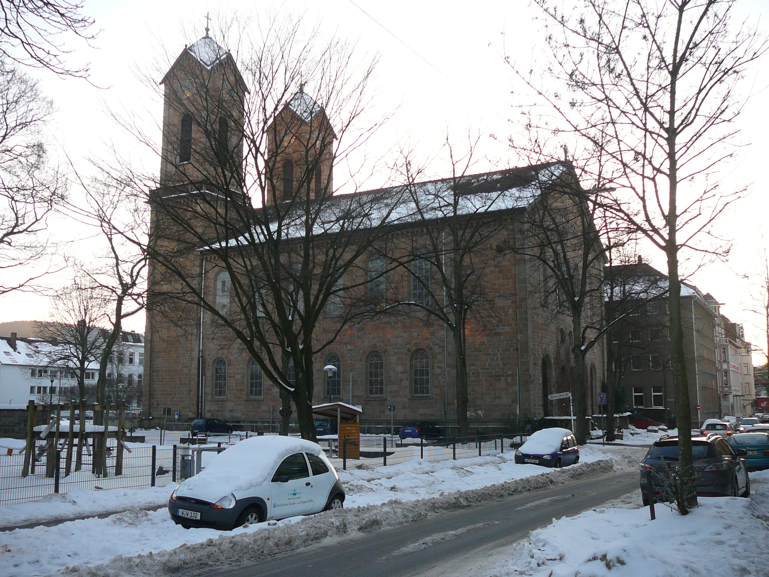 Am Brögel, Wuppertal